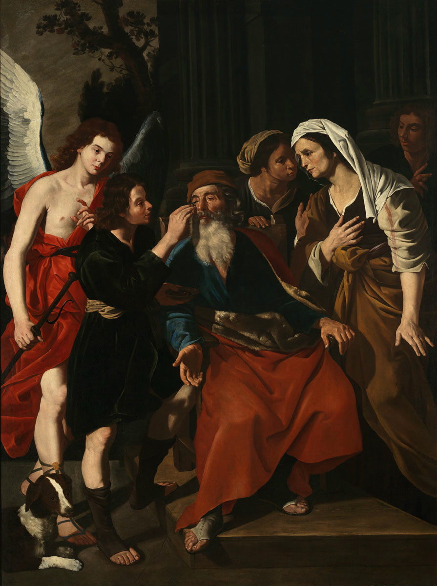 Tobiolo risana Tobia